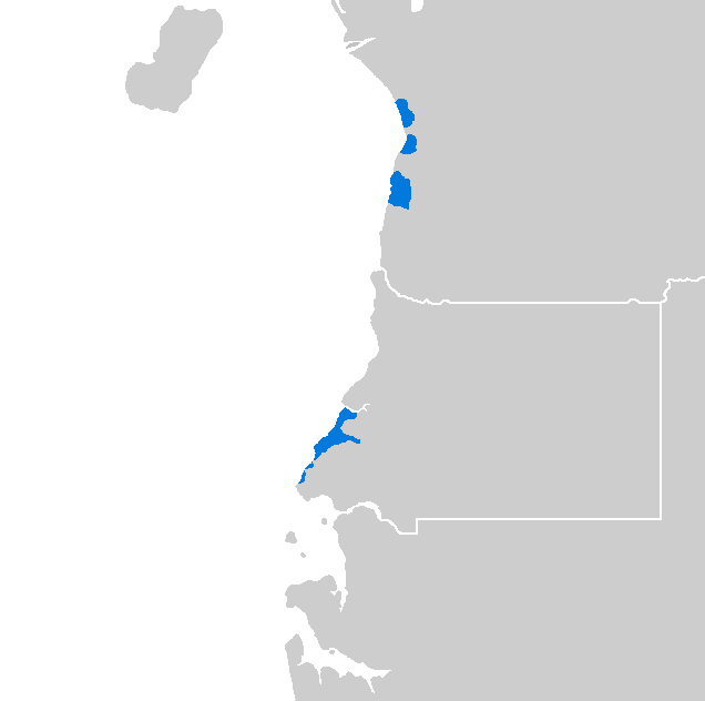 Idioma batanga